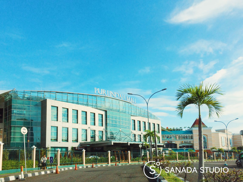 Gedung bagian depan Puri Indah Mall